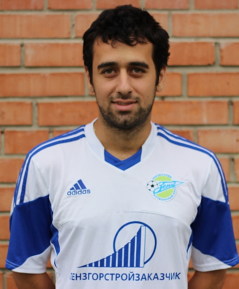 Игрок